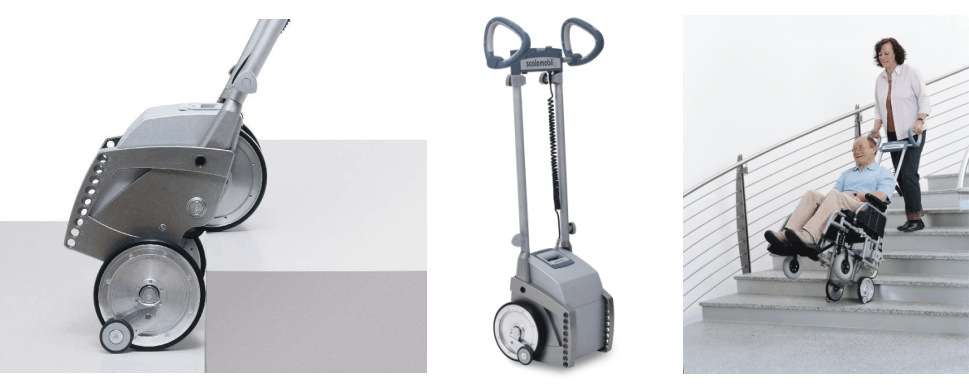 Typischer Treppensteiger für Rollstühle scalamobil